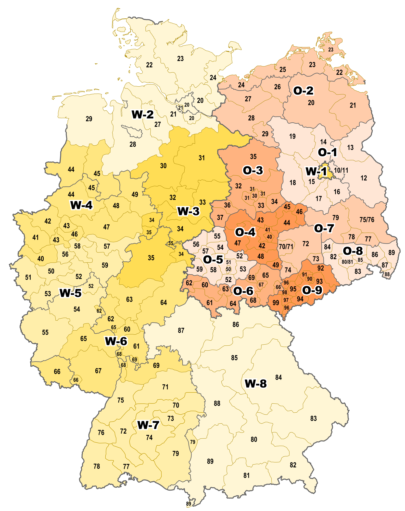 Karte des 4-stelligen PLZ-Systems in Deutschland (gültig bis 1993), eingeführt 1962 (BRD), bzw. in der DDR (1965), hier dargestellt mit den Grenzen der Bundesländer (BRD) und der Bezirke (DDR)